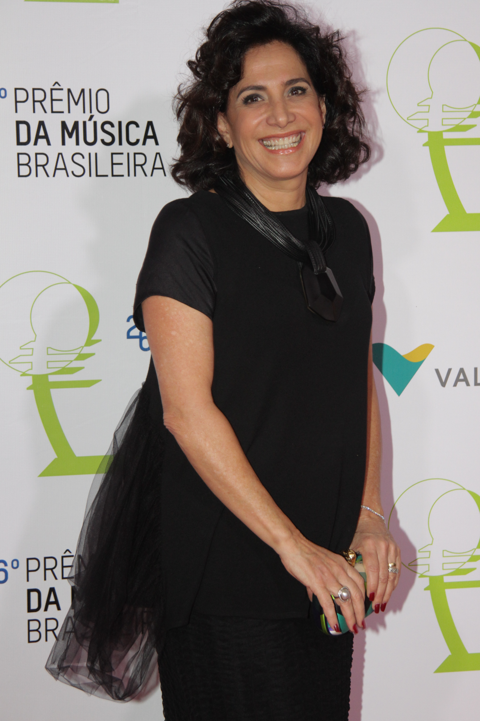 Totia Meireles - 26° Prêmio da Música Brasileira 2015, no Theatro Municipal, no Centro do Rio de Janeiro/RJ. (10/06/15) Foto: Roberto Valverde/Divulgacão